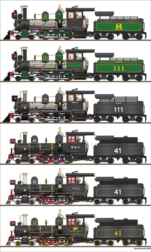 Exemplo de mudanças de pinturas de acordo com as mudanças administrativas de uma ferrovia brasileira.